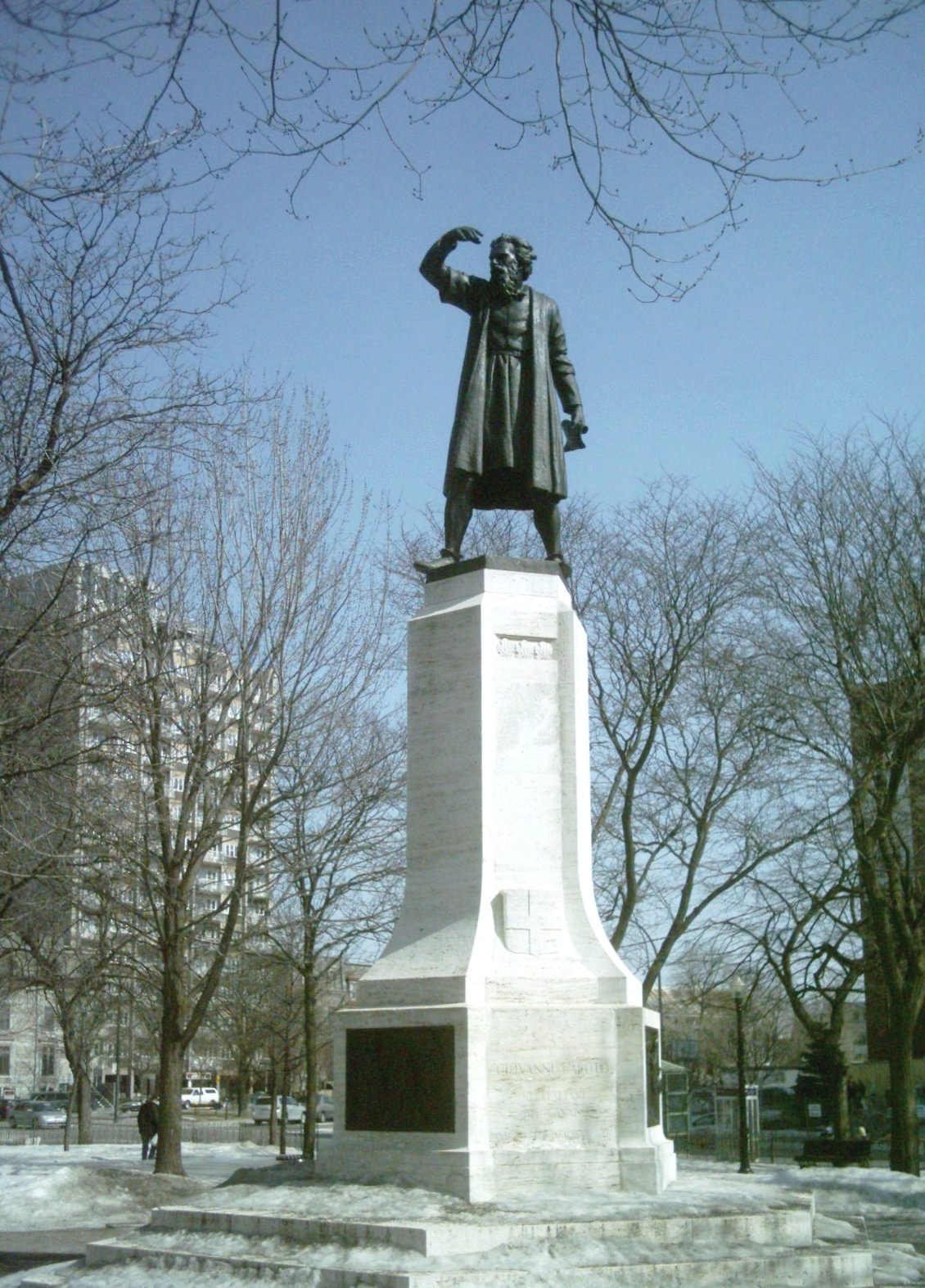 Monument au centre du Square Cabot à Montréal